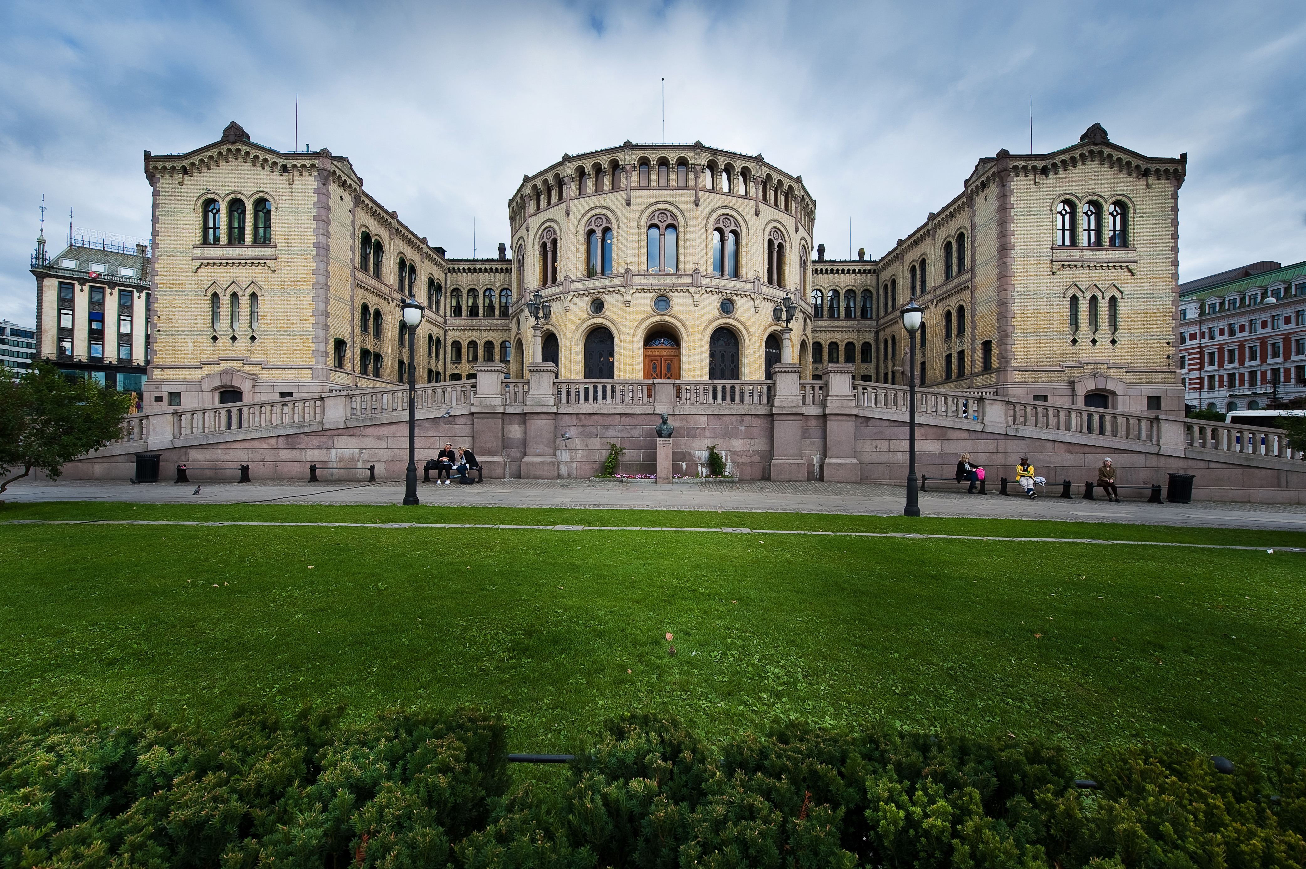 Stortinget, Oslo, Norway